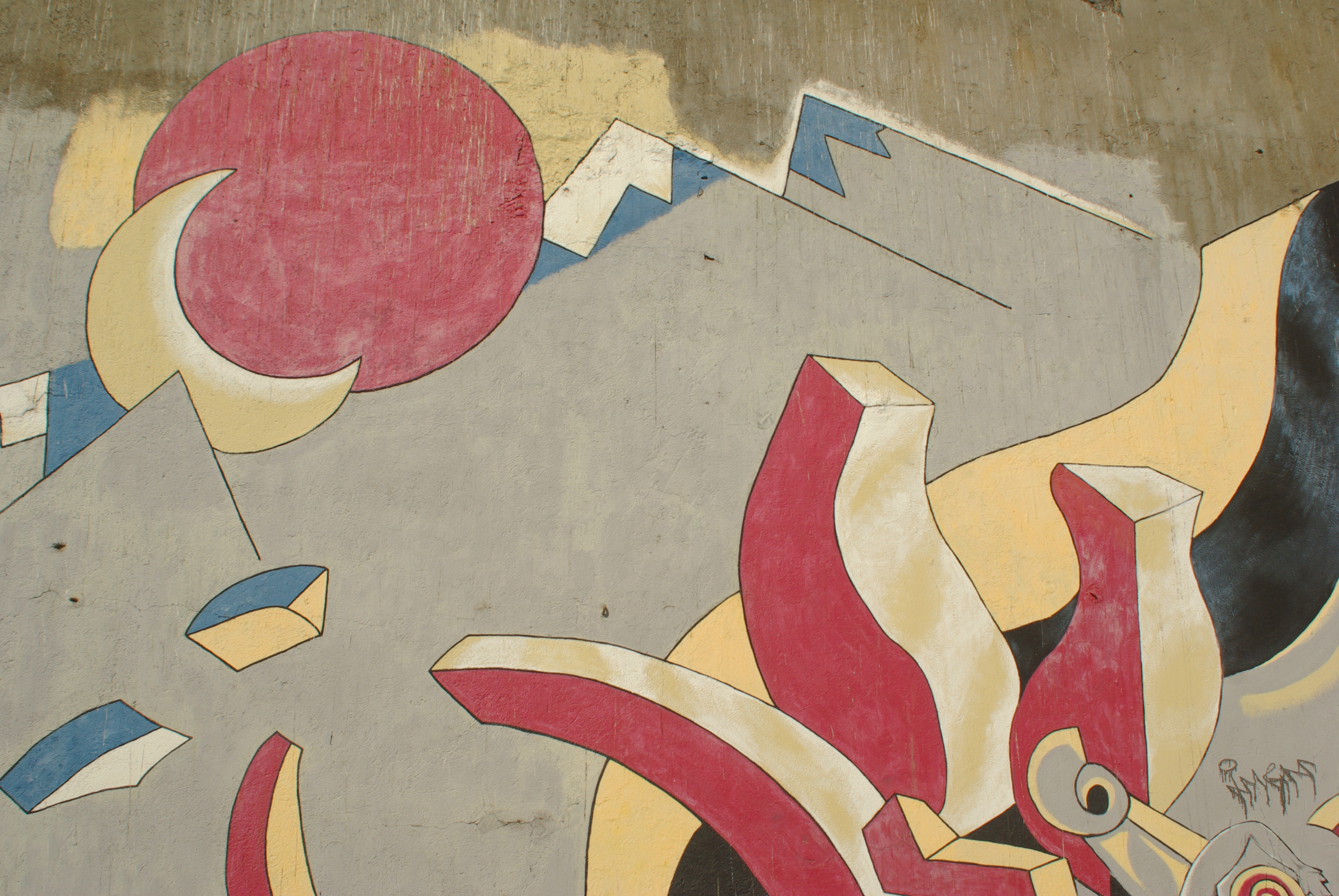 Mural nº11 del Museo a Cielo Abierto de Valparaíso, titulado En la playa de la casa amarilla (detalle), pintado por Mario Toral en 1992